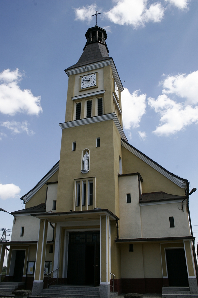 Kosciol św. Antoniego Padewskiego w Zgoniu (woj. slaskie), praca wlasna 2006